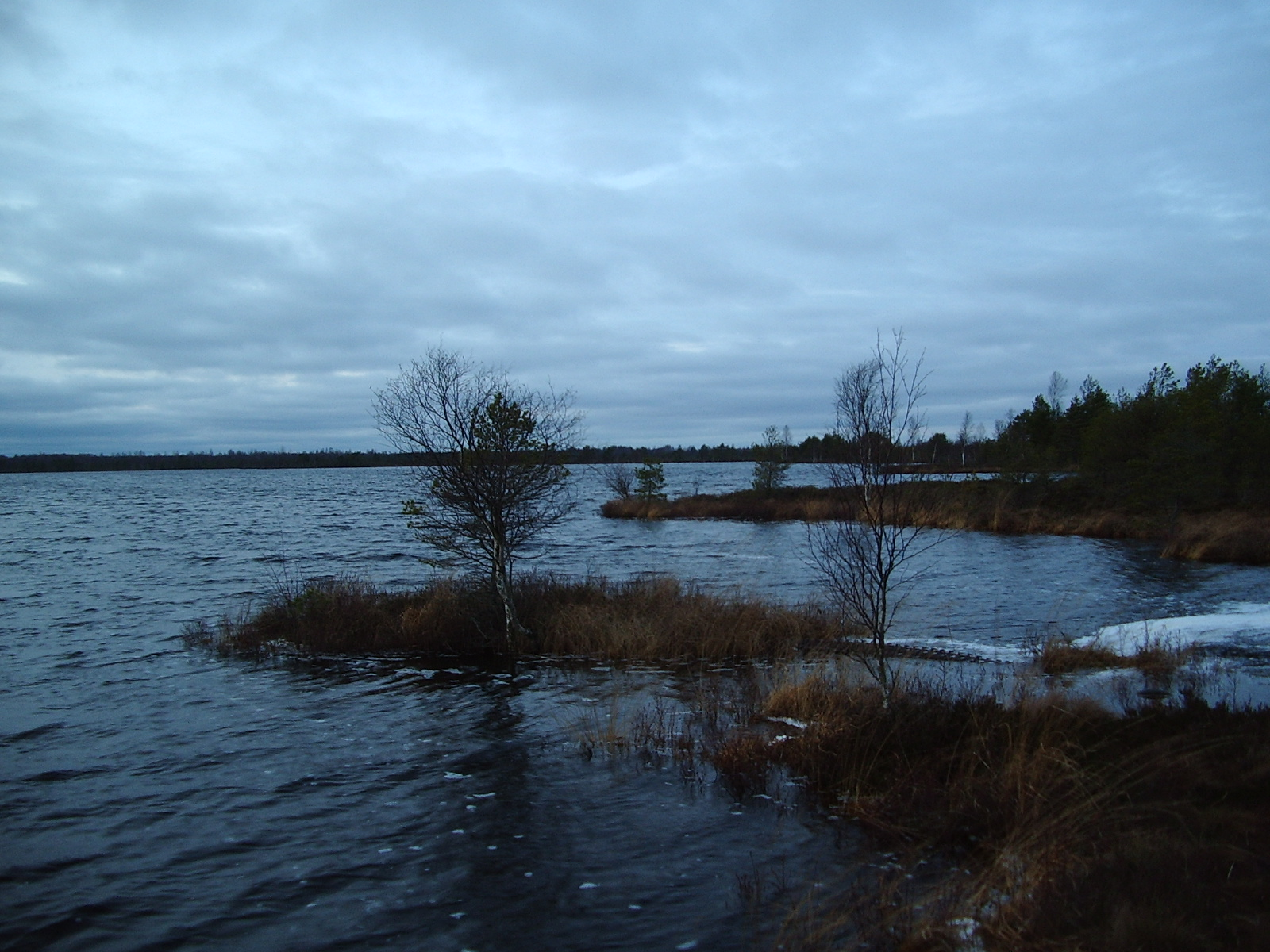 Koigi Pikkjärv